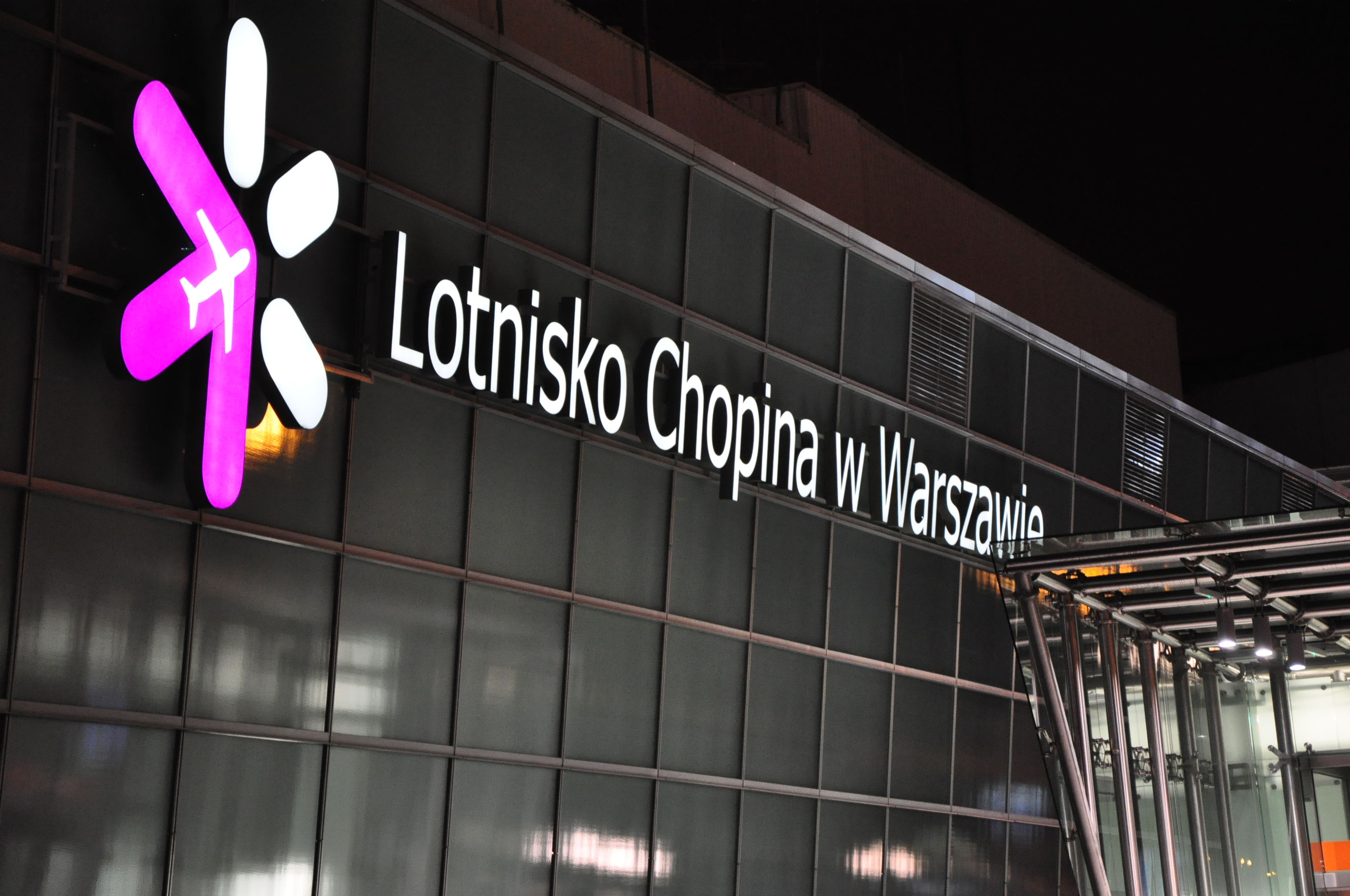 Lotnisko Chopina w Warszawie. Terminal A.